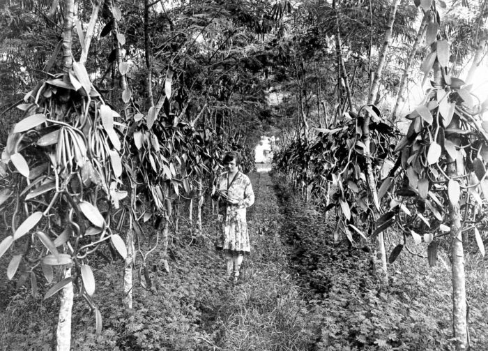 Repronegatief. Vanille-aanplant tegen lamtoro met indigofera als groenbemester op een onderneming op 1400 meter hoogte bij Semarang, Java